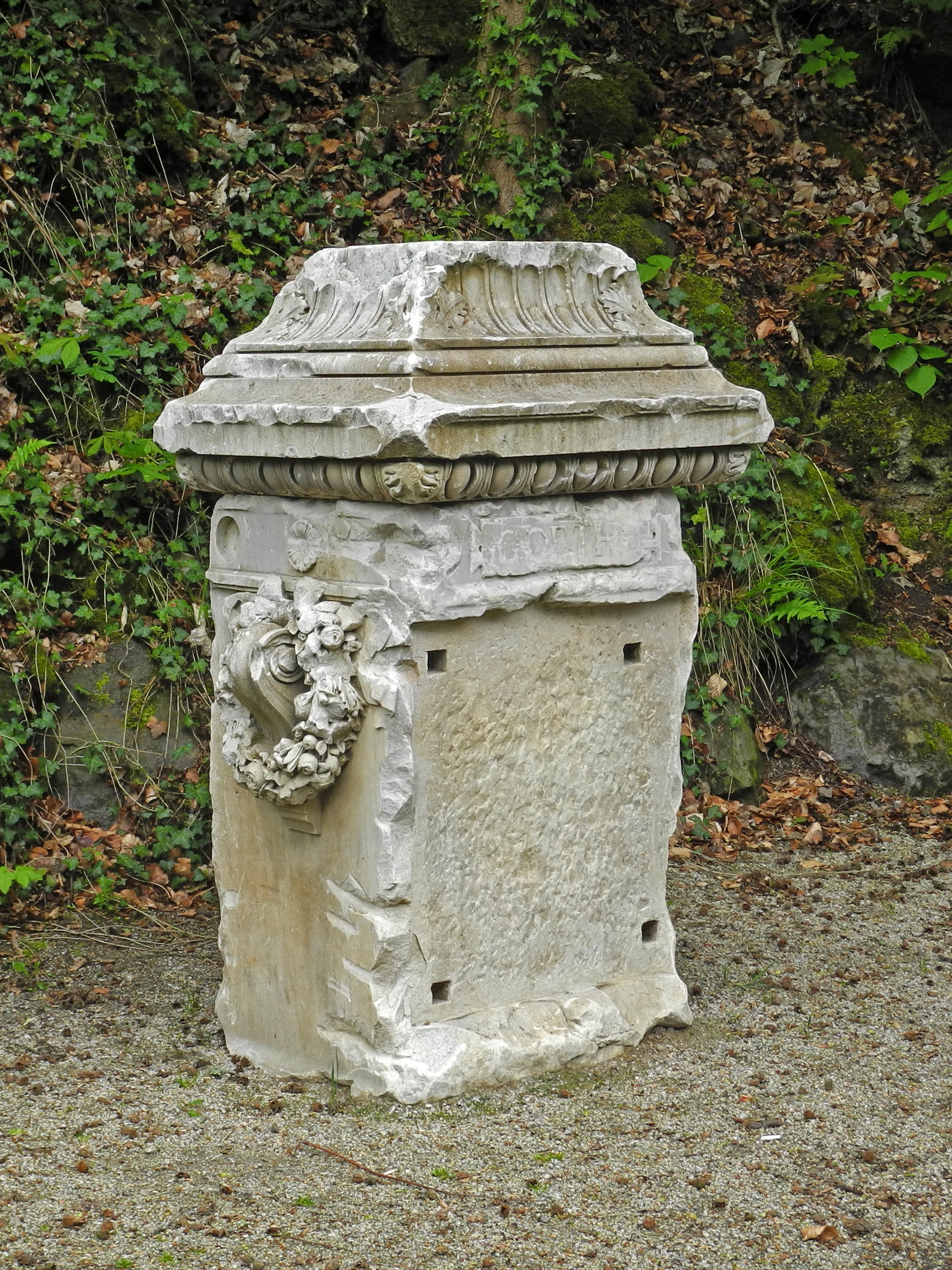 Gedenkstein am Goetheweg in Karlsbad (Karlovy Vary)